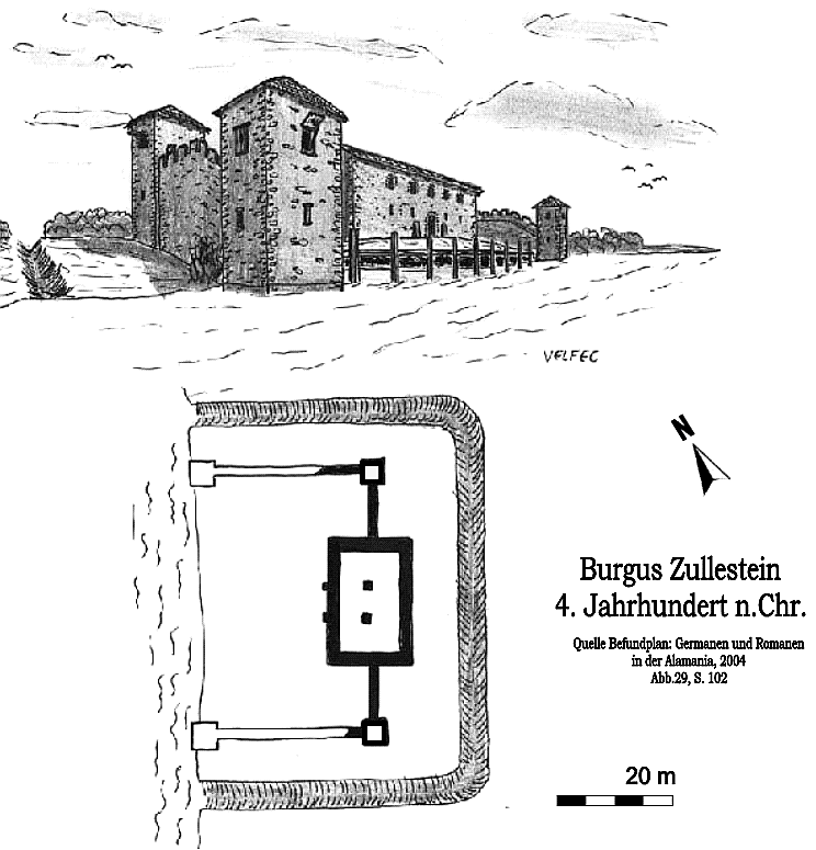 Rekonstruktionsversuch und Befundplan des römischen Ländeburgus von Zullestein (D), Zustand 4. Jhdt.n.Chr.